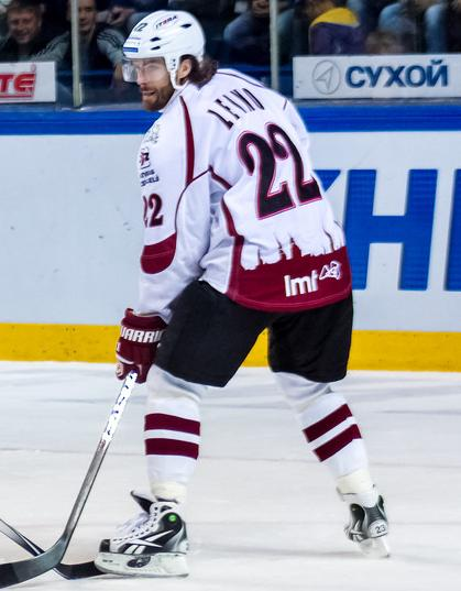 Нападающий рижского «Динамо» Вилле Лейно во время матча чемпионата КХЛ против хабаровского «Амура» 12 сентября 2015 года.